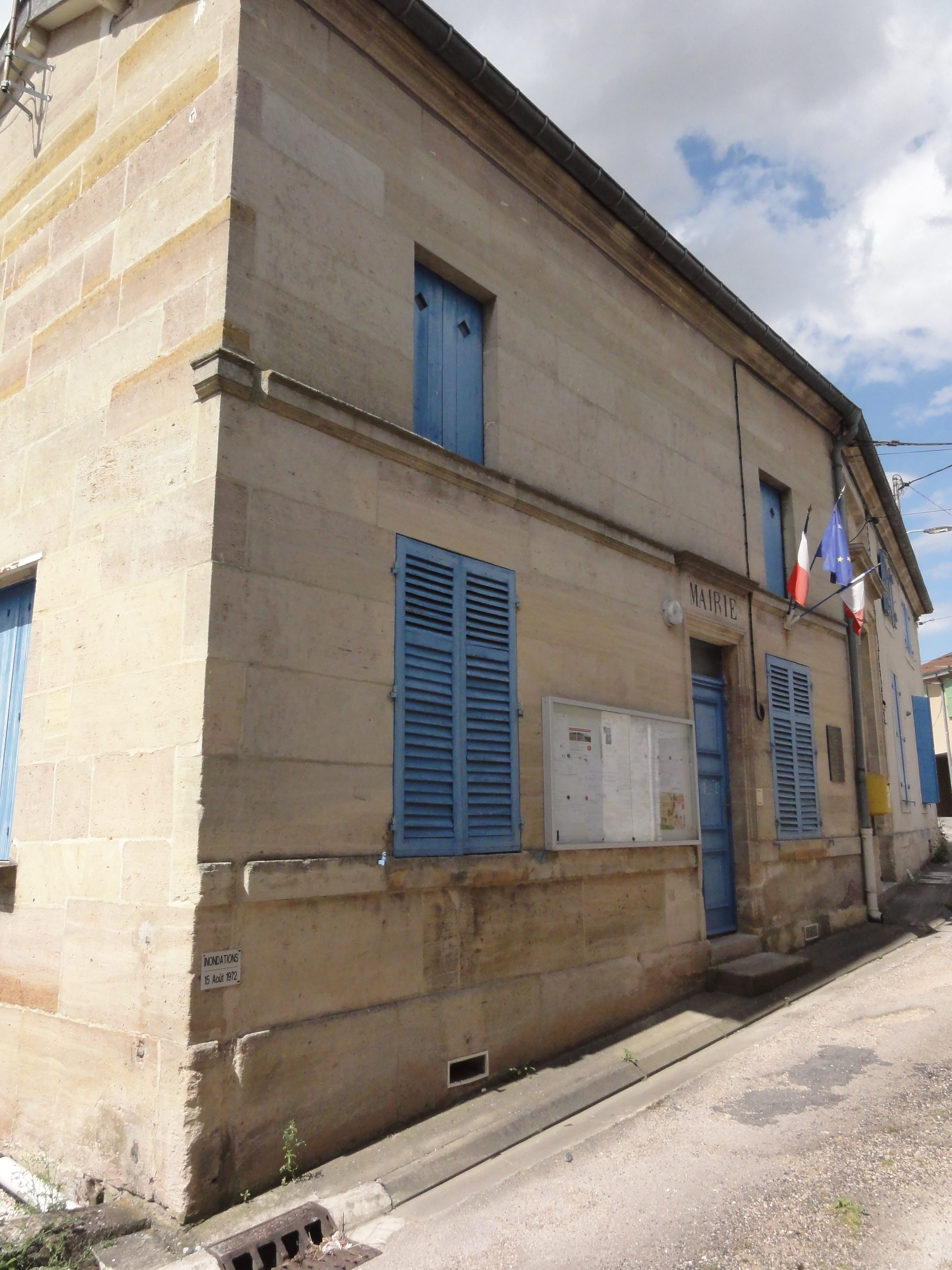 Naives-Rosières (Meuse) Rosières, mairie